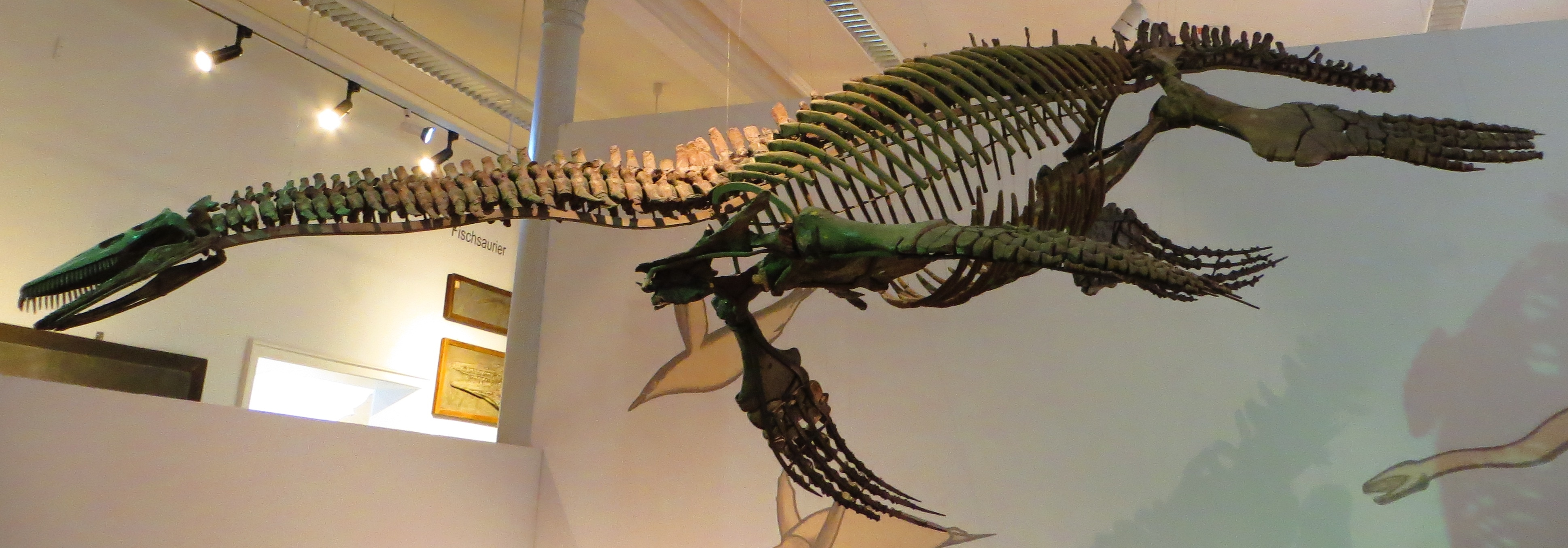 Fossil of Cryptoclidus, an extinct reptile - Took the picture at Museum of Paleontology, Tuebingen